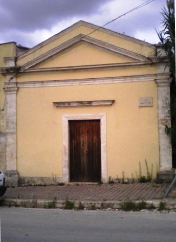 Facciata